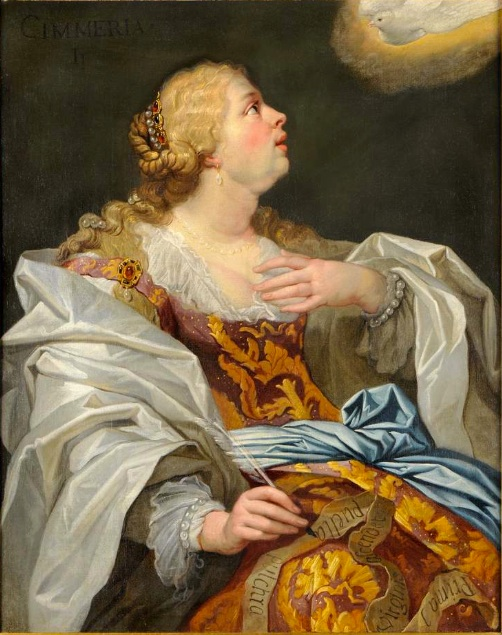 Sibylla Cimmeria